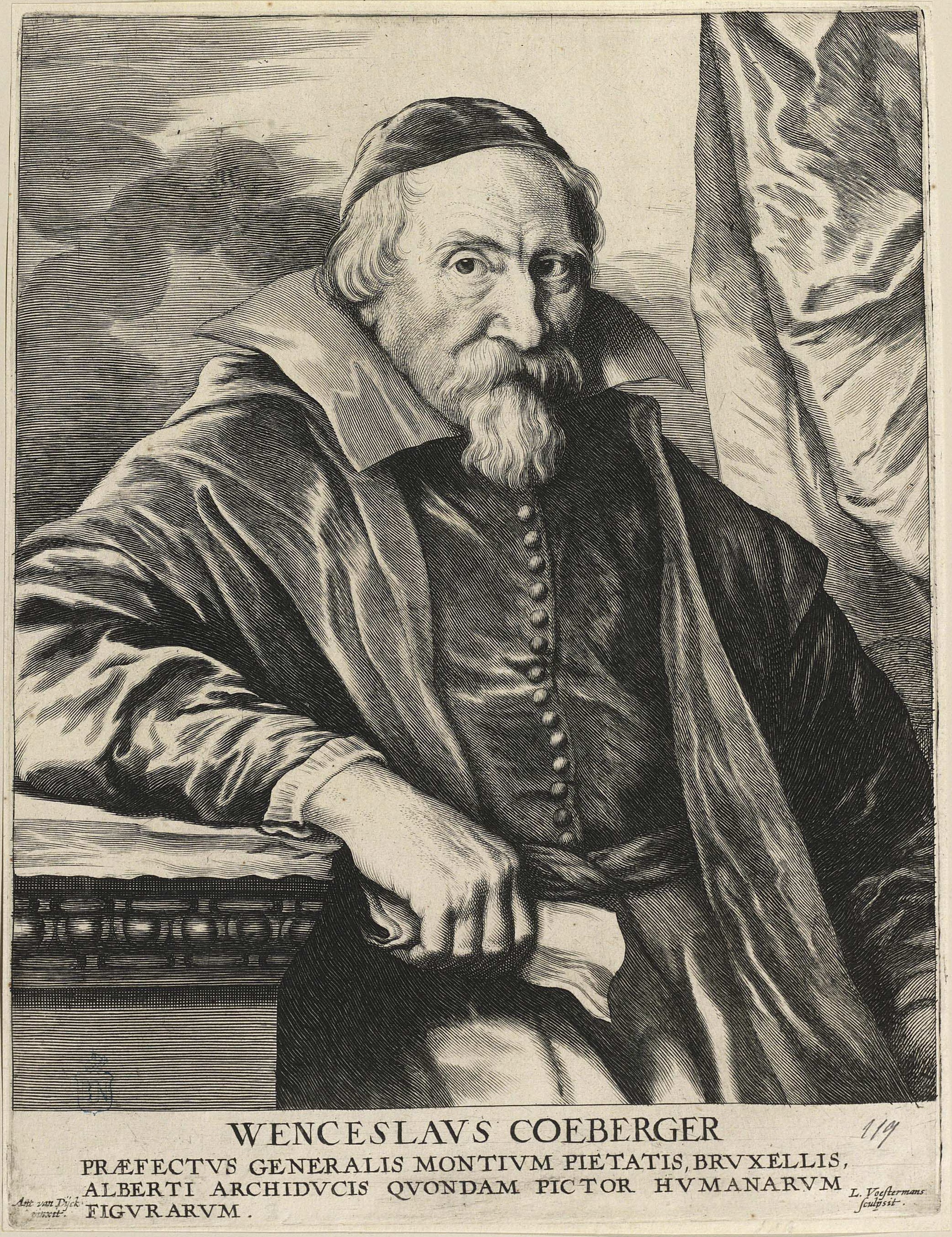 Retrato de Wencesalus Coebergher, aguafuerte y buril, grabado de Lucas Vorsterman sobre dibujo de Anton van Dyck, Madrid, Biblioteca Nacional de España.